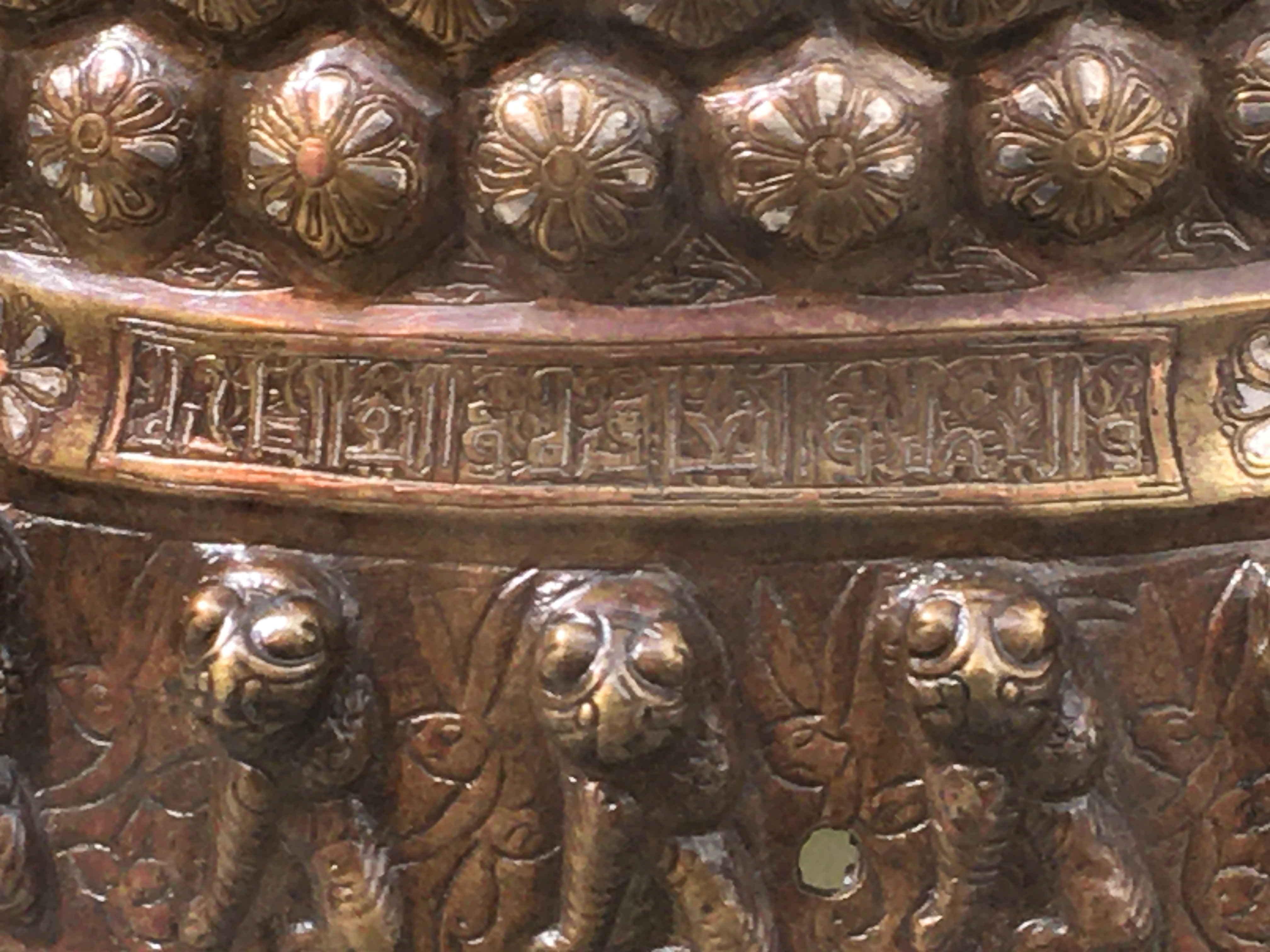 Cartouche en écriture coufique - Chandelier aux canards - OA 6315 - Louvre